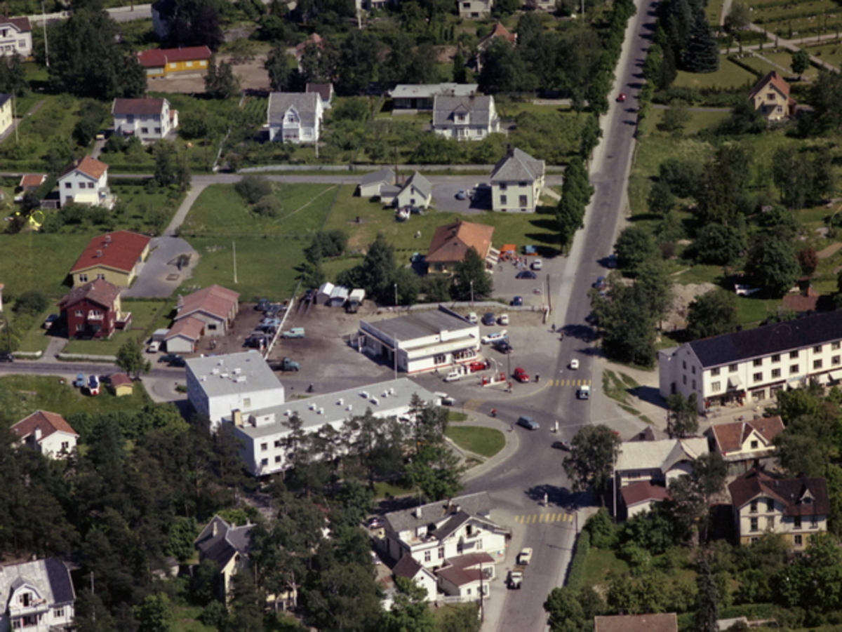 Sæter med senterbebyggelse, 1962. Nordstrandveien.